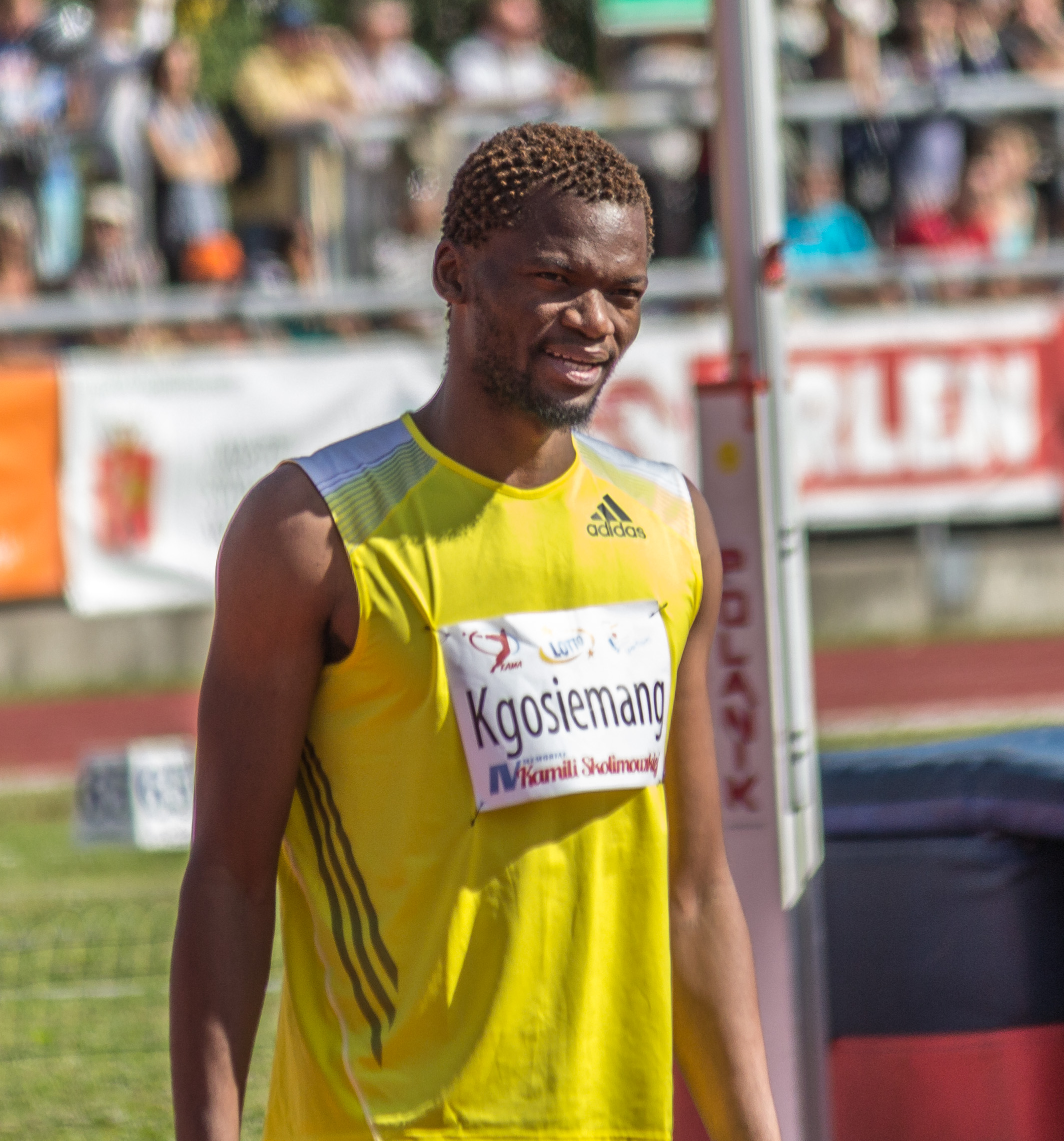 Memoriał Kamili Skolimowskiej w Warszawie, 2013-08-25